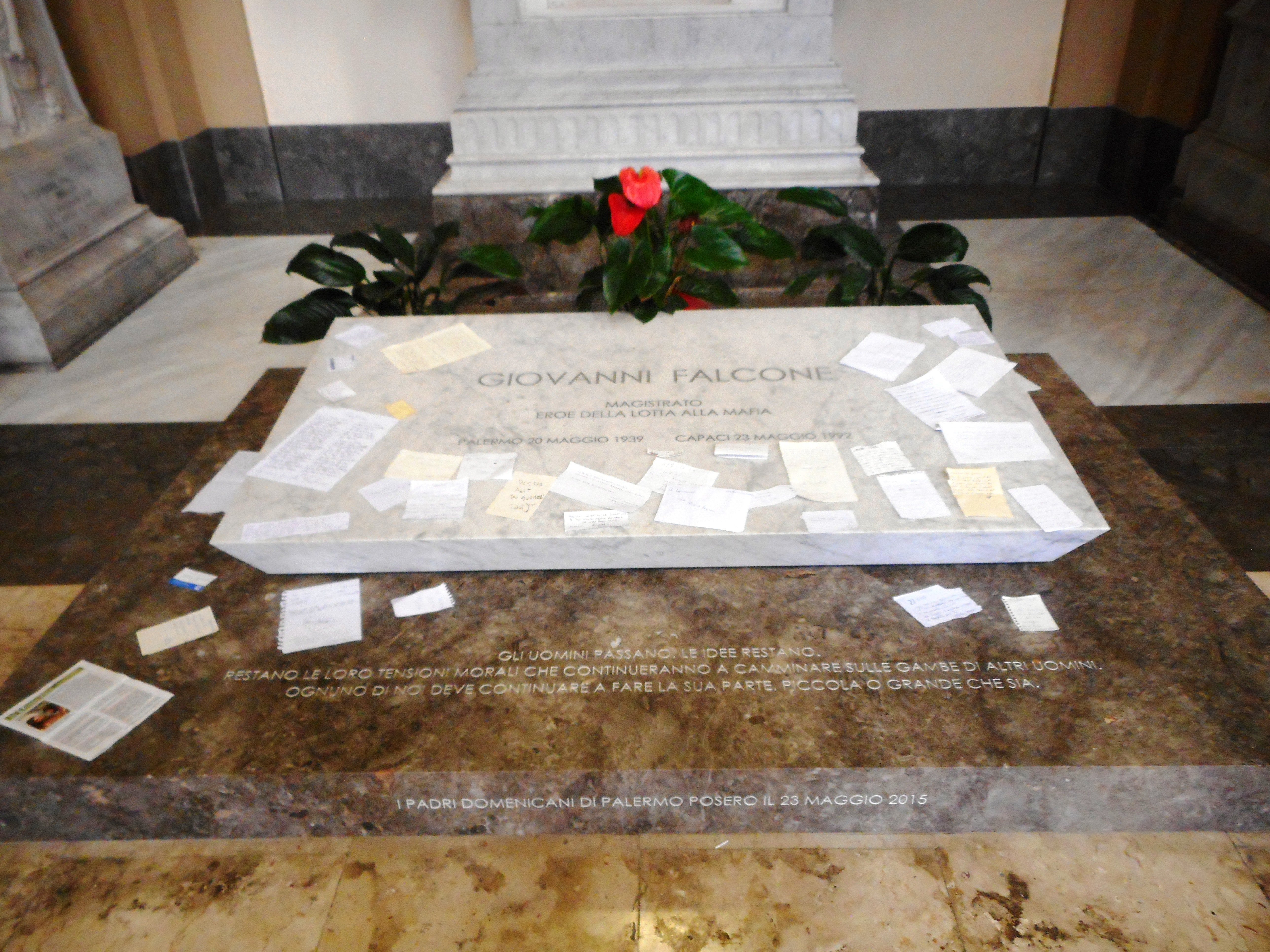 Tomba di Giovanni Falcone a San Domenico